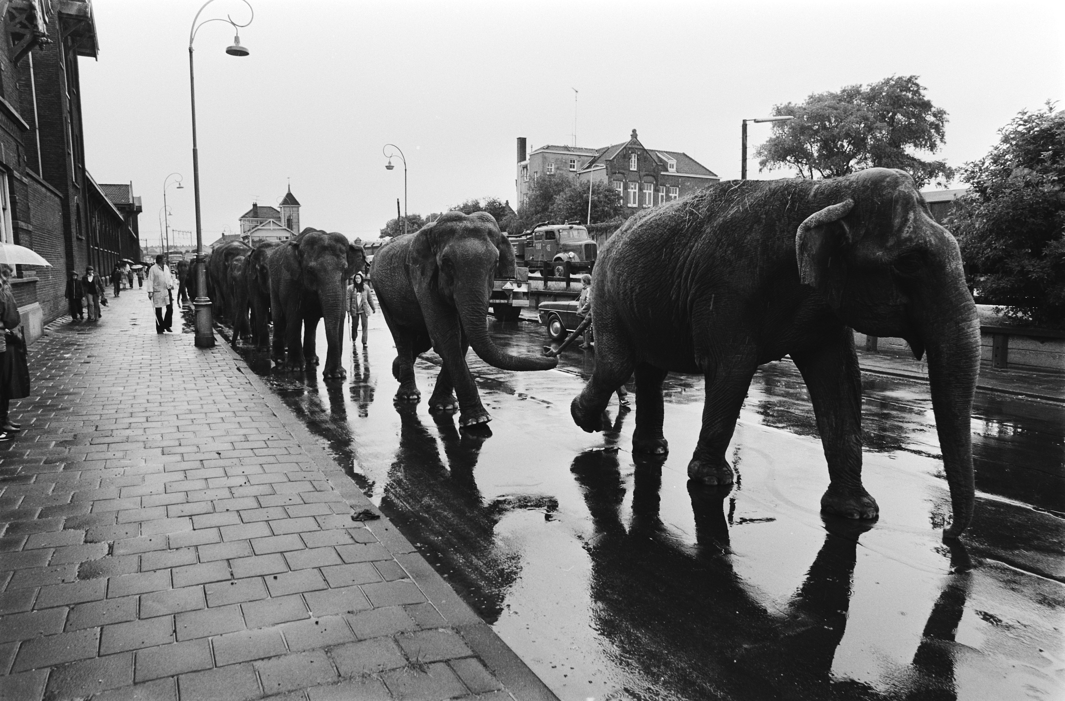 Collectie / Archief : Fotocollectie Anefo Reportage / Serie : [ onbekend ] Beschrijving : Aankomst olifanten i.v.m. voorstelling Circus Krone , Amsterdam; een rij olifanten Datum : 1 juli 1980 Locatie : Amsterdam, Noord-Holland Trefwoorden : OLIFANTEN, aankomsten, circussen Persoonsnaam : Circus Krone Fotograaf : Antonisse, Marcel / Anefo Auteursrechthebbende : Nationaal Archief Materiaalsoort : Negatief (zwart/wit) Nummer archiefinventaris : bekijk toegang 2.24.01.05 Bestanddeelnummer : 930-9072